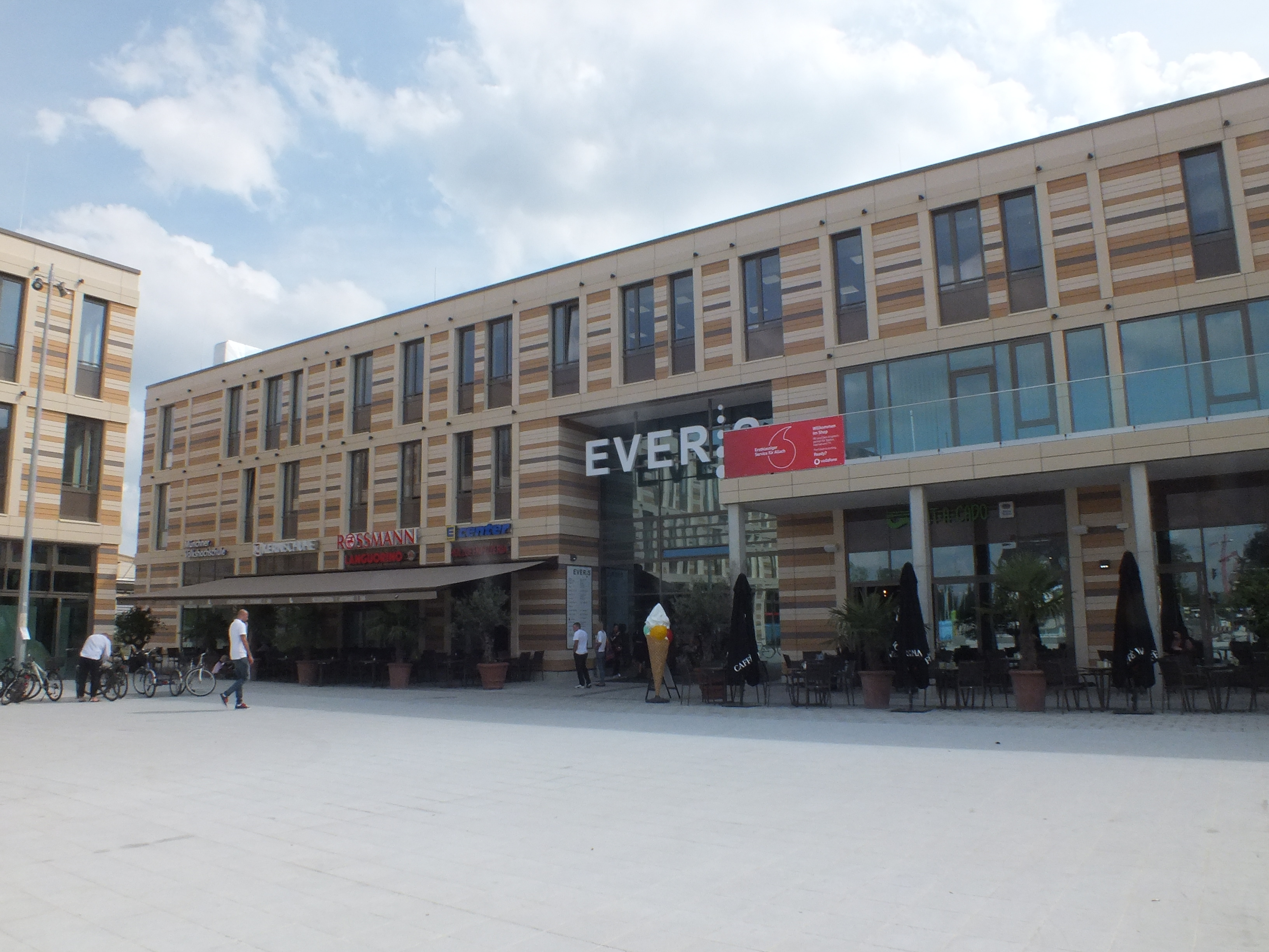 Einkaufszentrum "Das EVER.S" in München-Allach